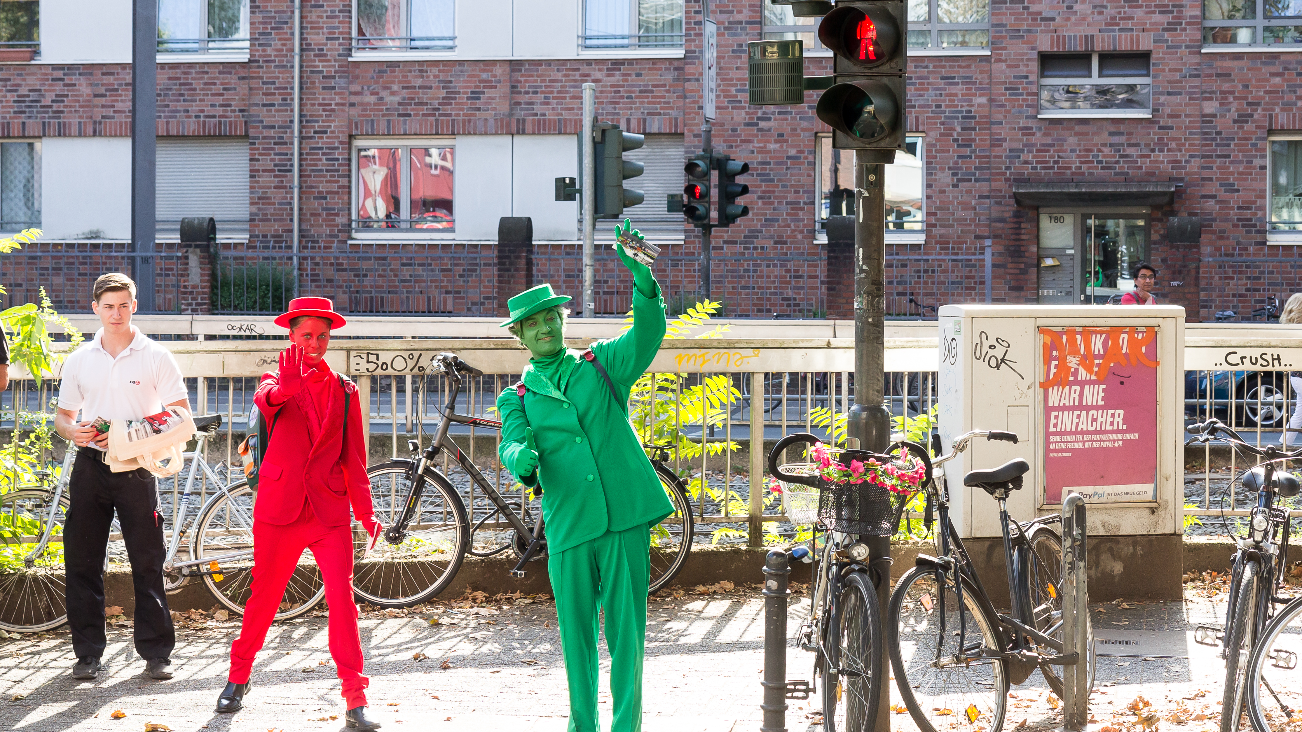 Köln steht bei Rot. Aktionstag „Schule hat begonnen“: Pantomime mit Ampelmännern/Ampelfrauen in Neuehrenfeld an der Stadtbahn-Haltestelle „Nußbaumerstraße“